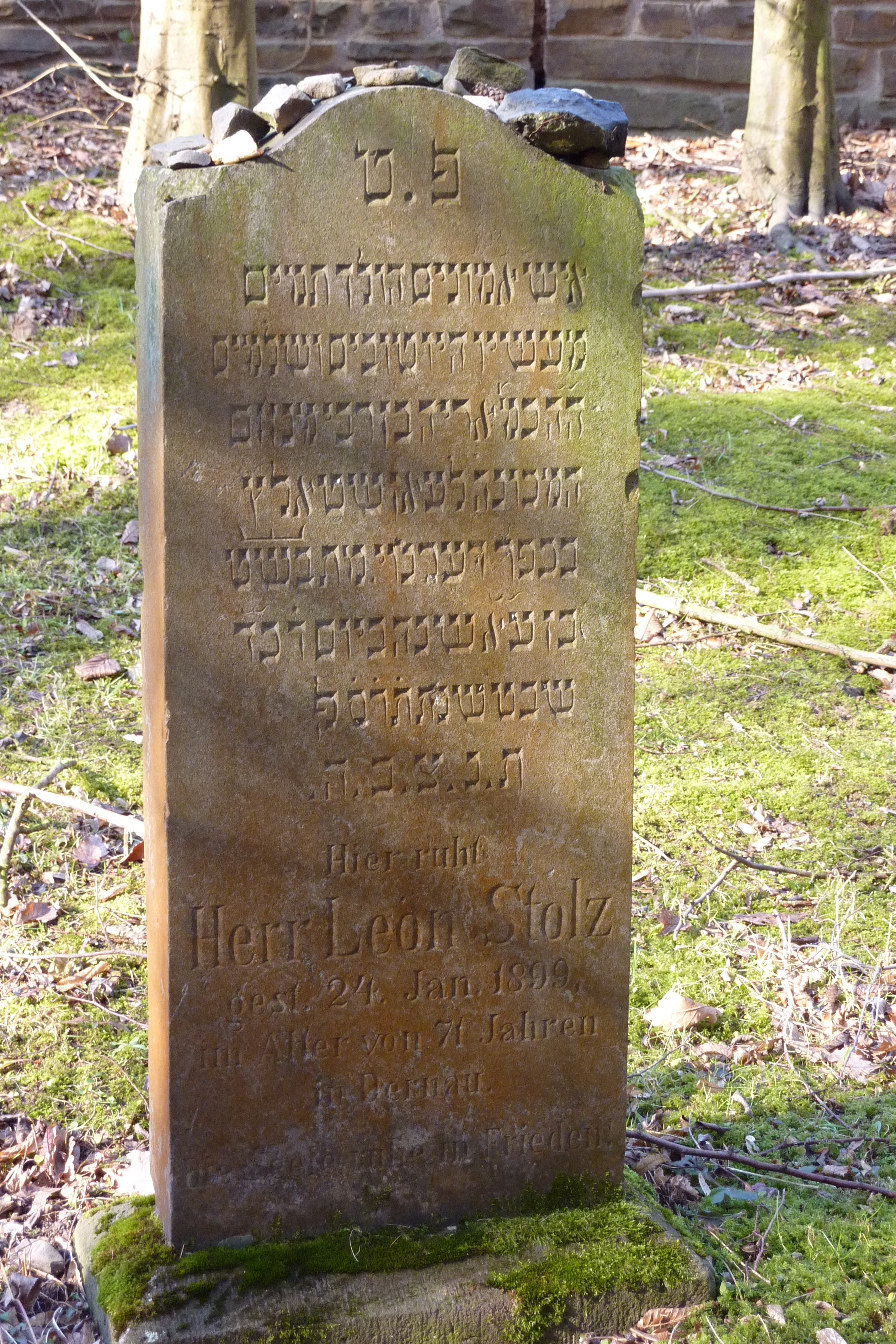 Jüdischer Friedhof Dernau, Grabstein von Leon Stolz (gest. 24. Januar 1899)